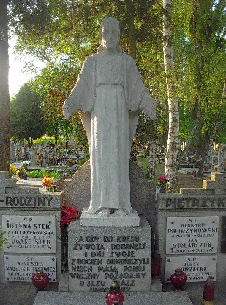 Cmentarz Trójcy Świętej, Bydgoszcz